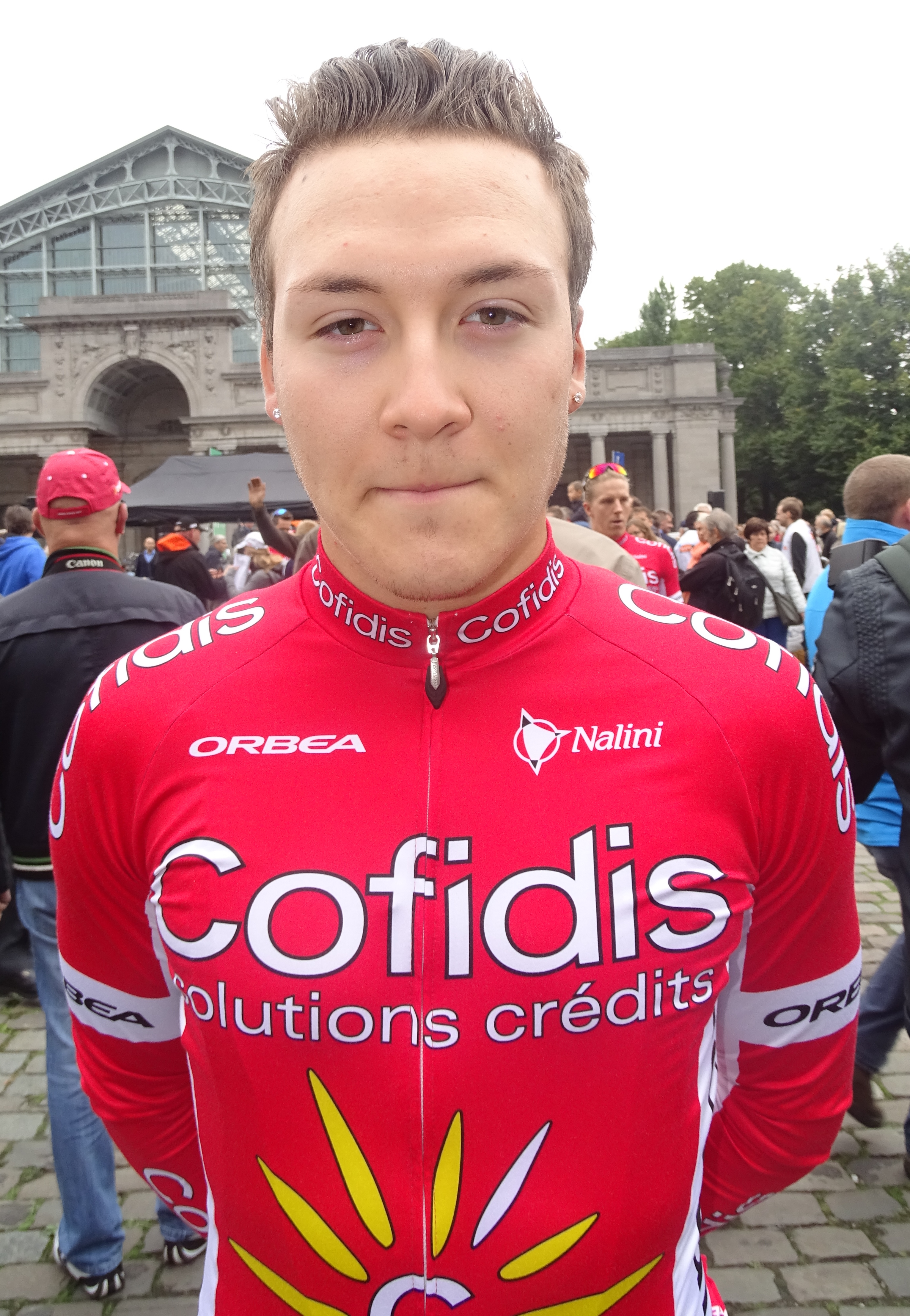 Brussels Cycling Classic 2015.